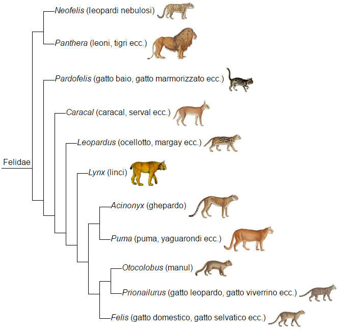 Phylogeny of felidae